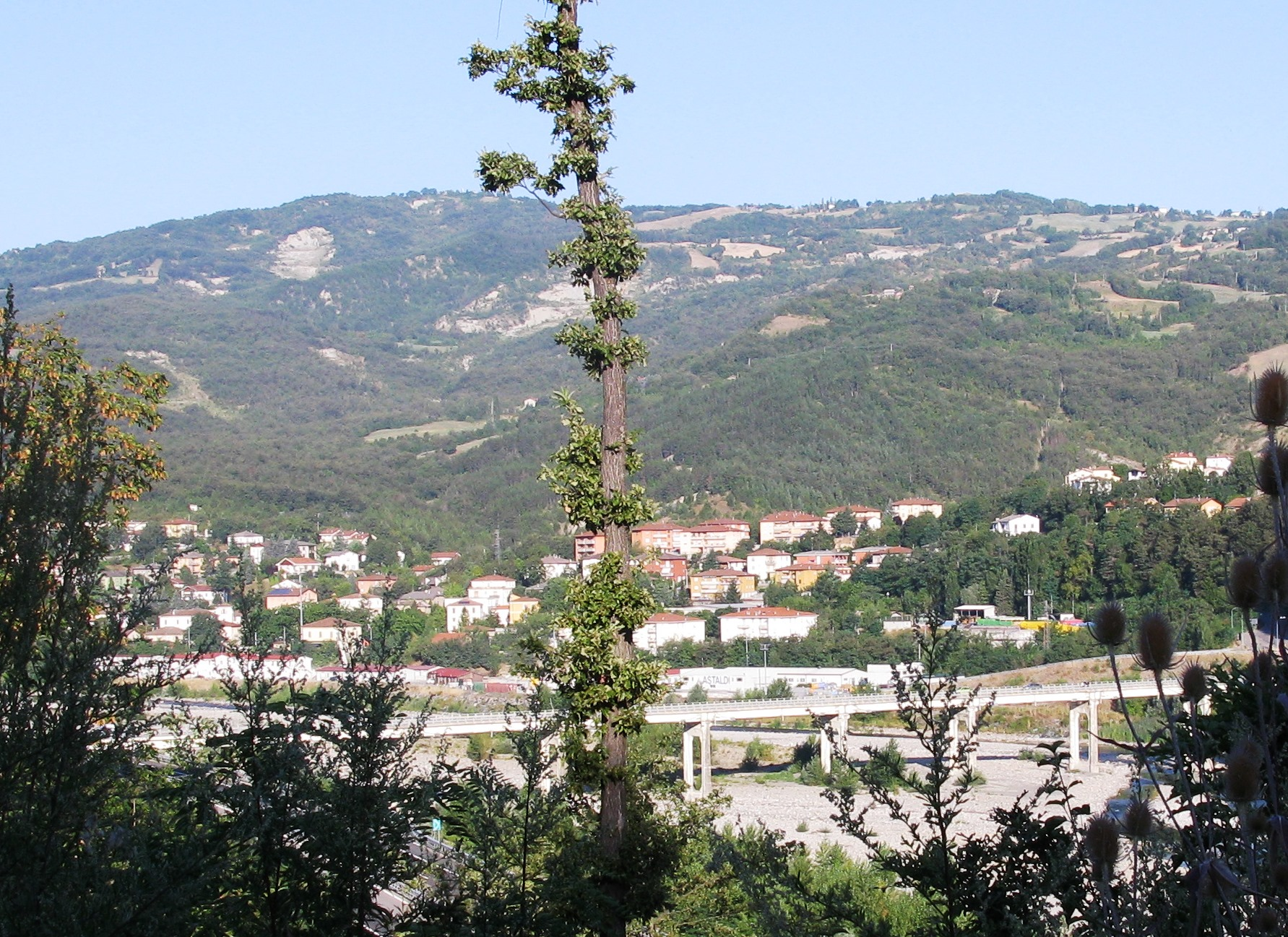 Panorama di Solignano.